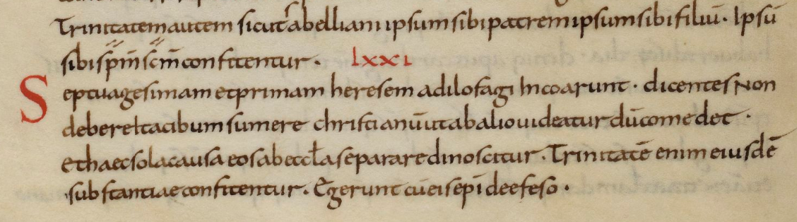 Praedestinatus. Глава LXXI. Аделофаги. Рукопись IX века. Национальная библиотека Франции